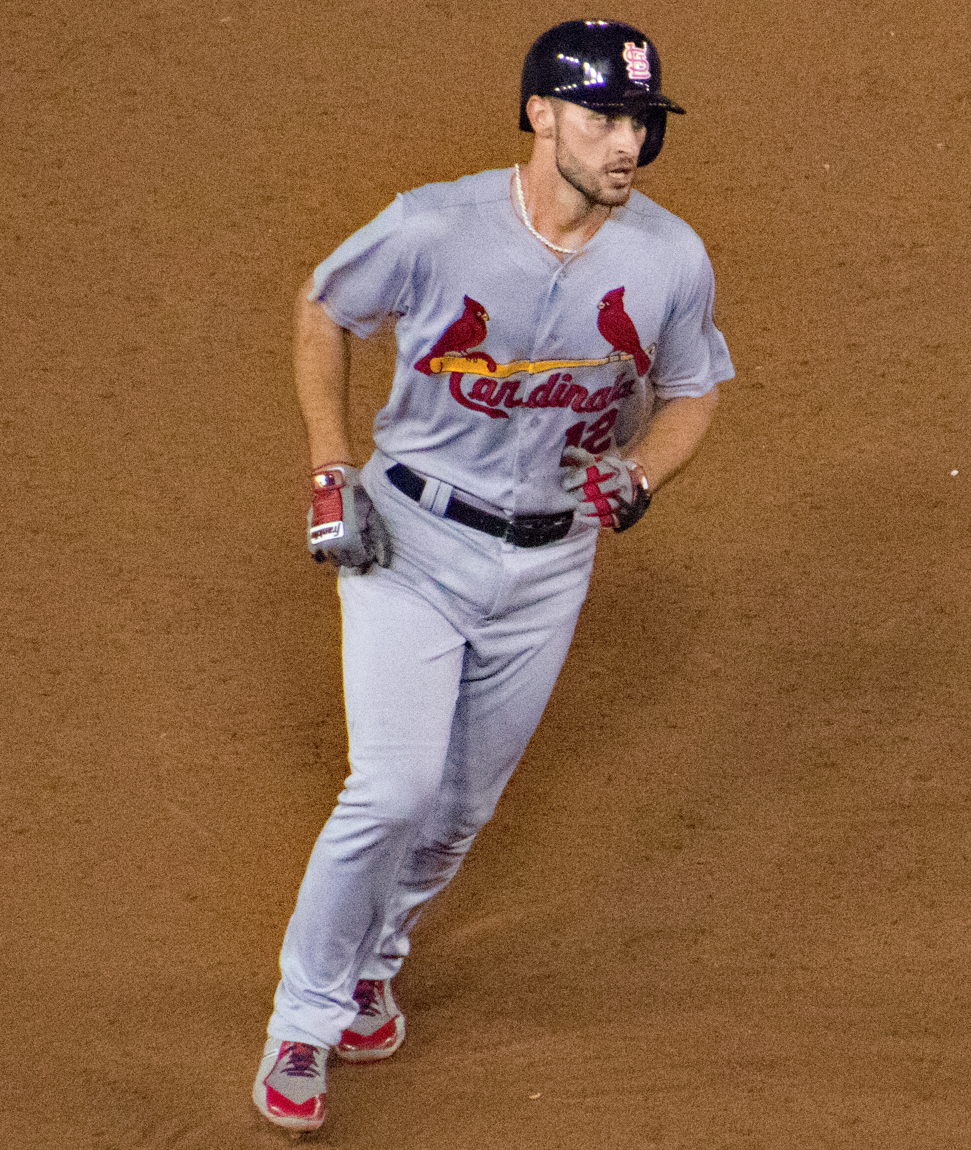 Paul DeJong